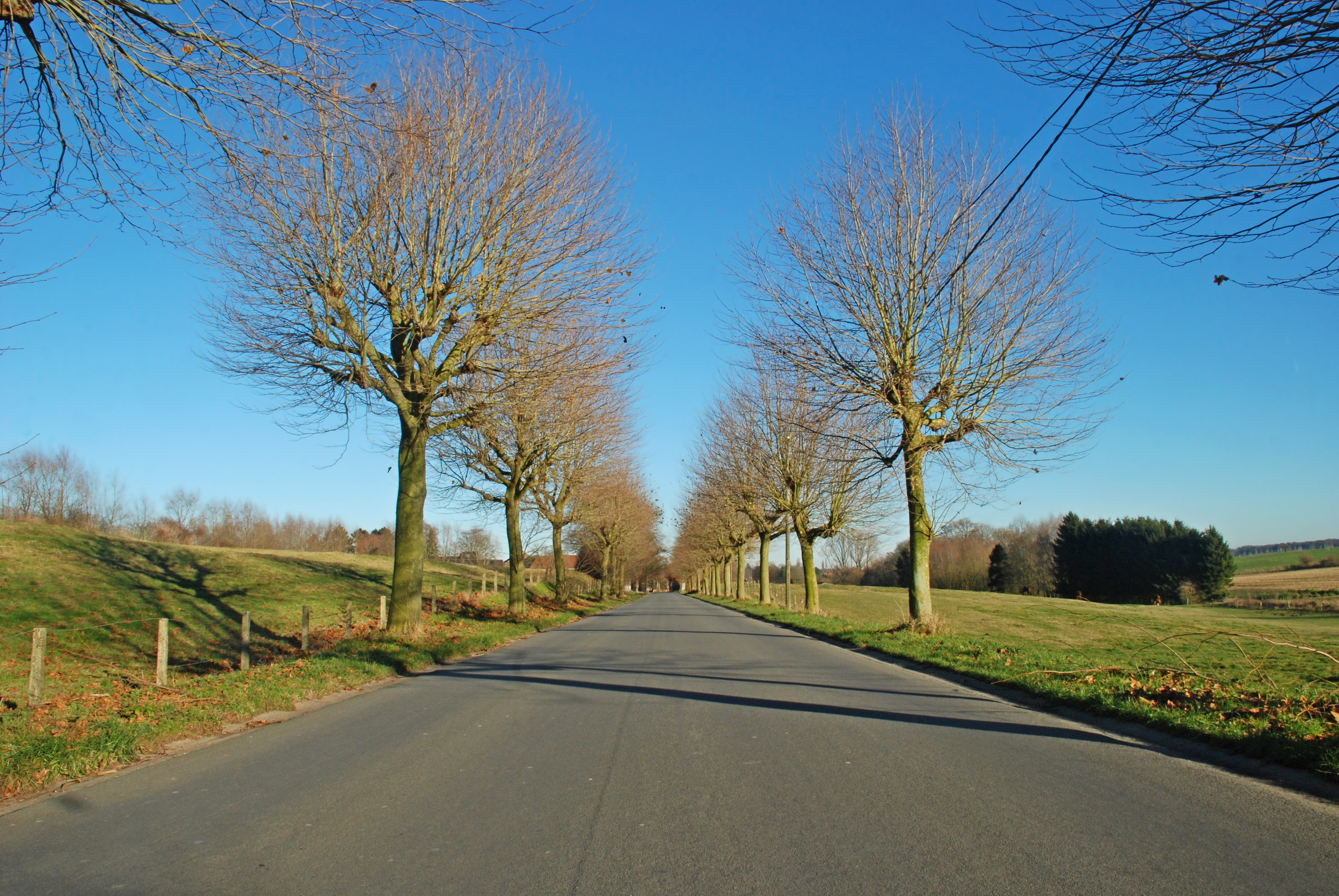 Belgique - Brabant wallon - Genappe - Glabais - Rue Haute